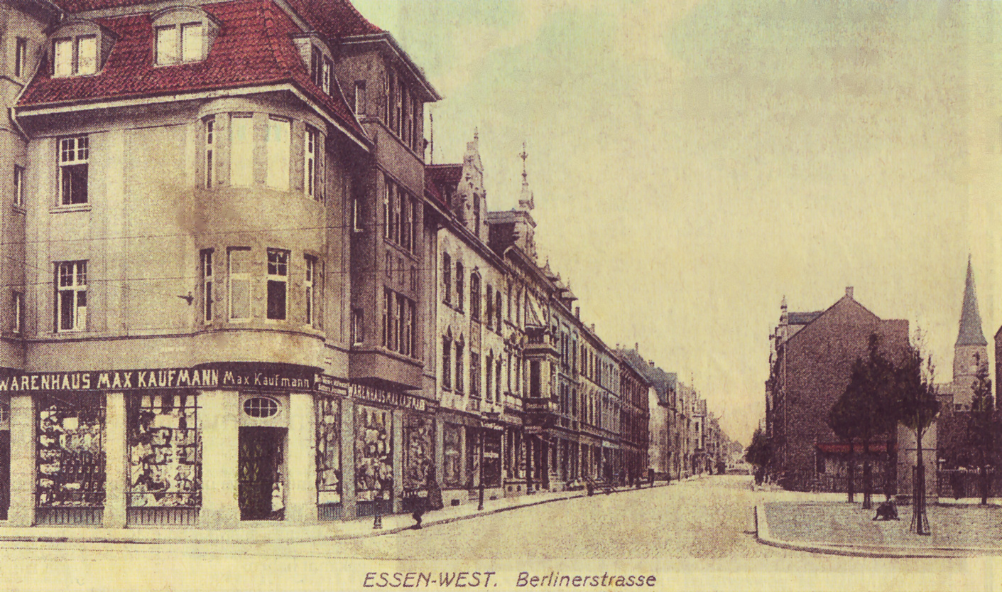 Berliner Straße in Essen-Frohnhausen, rechts die alte St. Antonius-Kirche